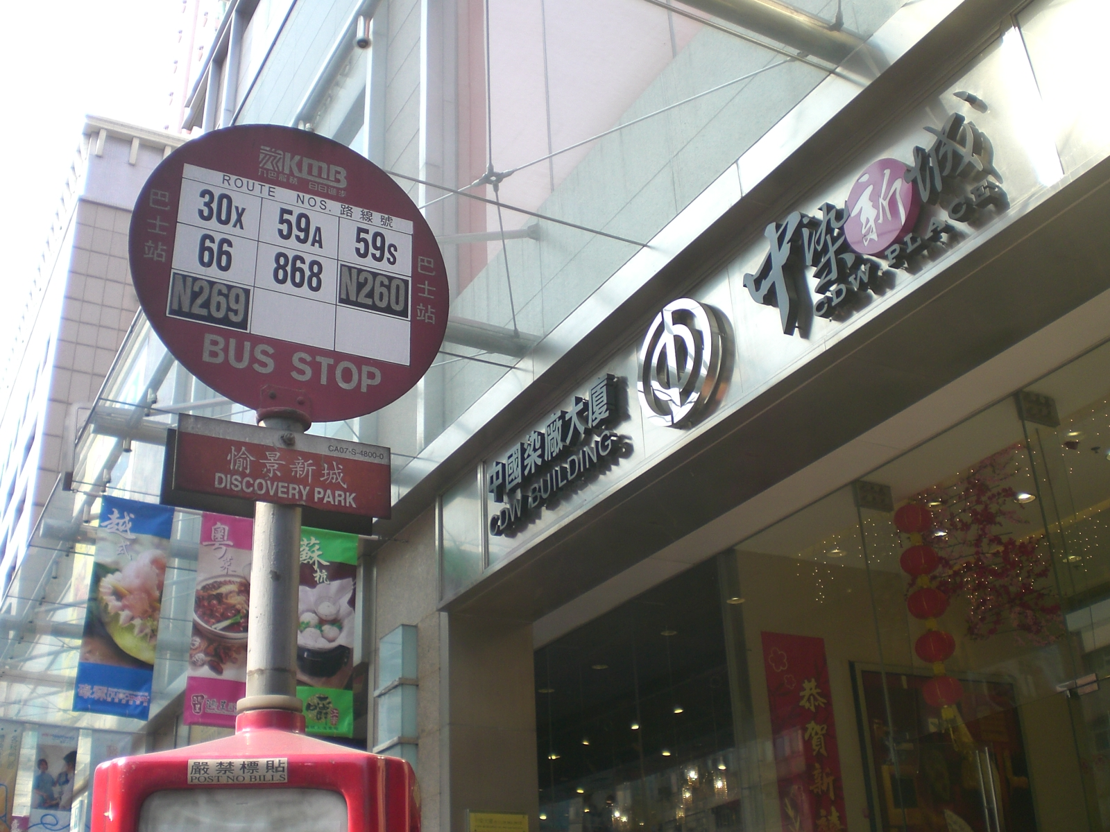 香港荃灣青山公路巴士站，近愉景新城及中染新城